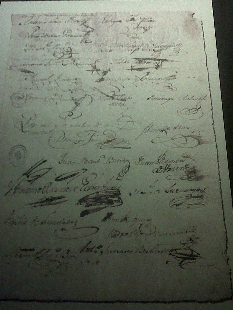 Fotografía tomada por mi en el Museo Histórico Nacional de la República Argentina del petitorio del Cabildo abierto del 25 de mayo de 1810.